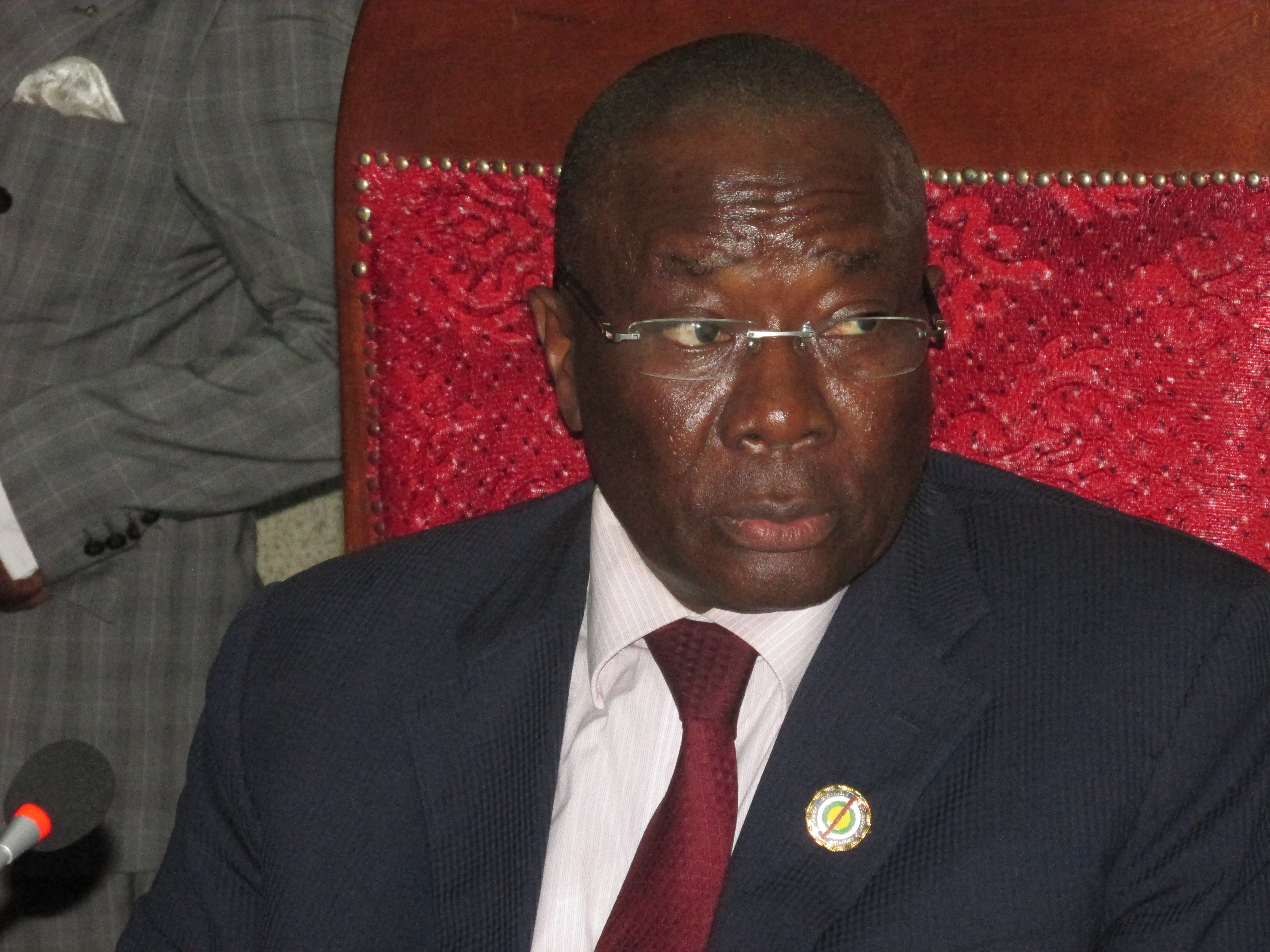 L'ancien ministre centrafricain Abdoul Karim Meckassoua, député du quartier musulman du PK5 de Bangui, devient le premier président de l'Assemblée nationale de la Centrafrique, à Bangui, Centrafrique, 6 mai 2016. (VOA/Freeman Sipila)